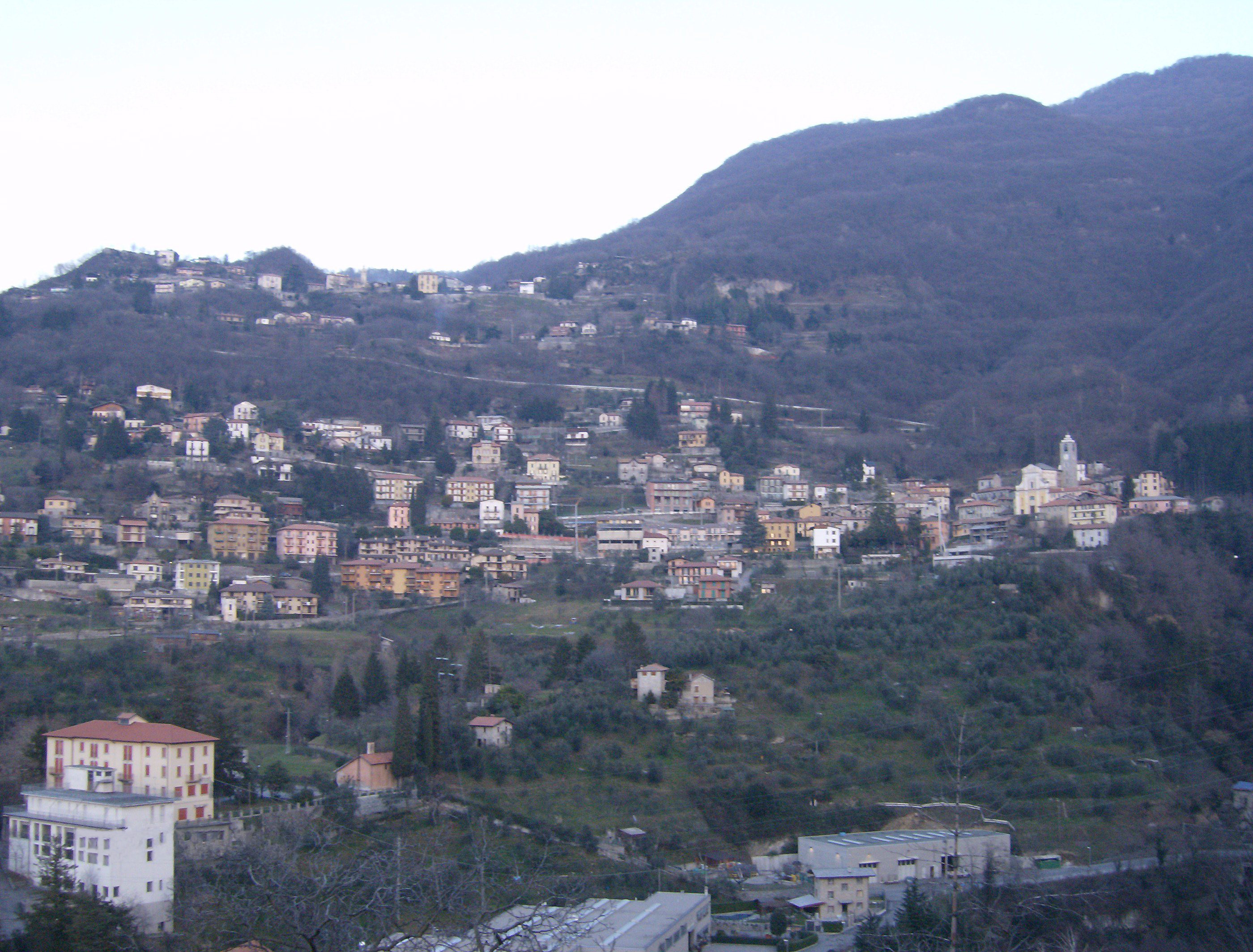 Abitato del capoluogo del comune di Perledo